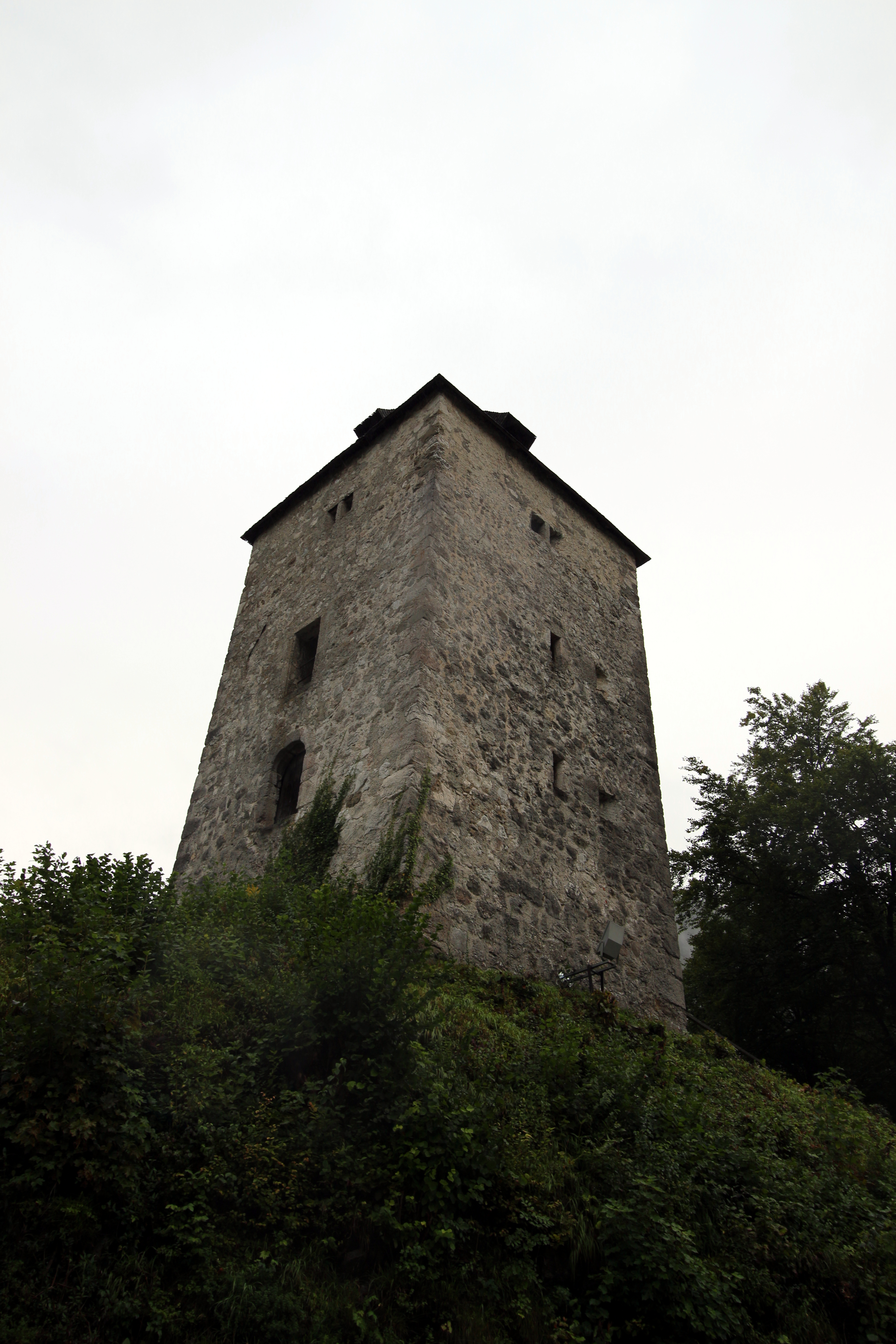 Schellenberger Turm an der B305 Richtung Salzburg. This is a photograph of an architectural monument.